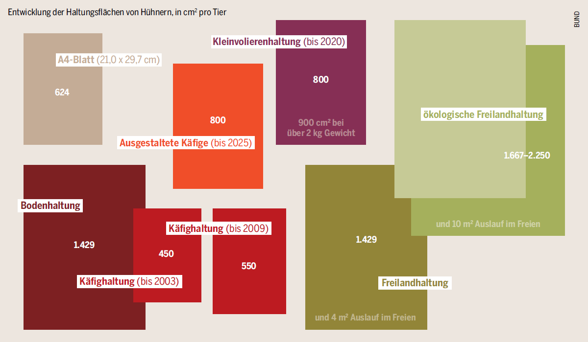 Haltungsfläche von Hühnern, Quelle: "Fleischatlas - Daten und Fakten über Tiere als Nahrungsmittel", Heinrich-Böll-Stiftung, BUND, Le Monde diplomatique